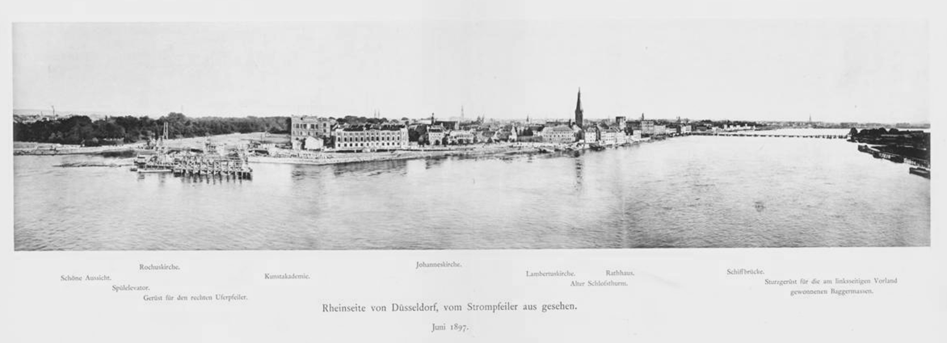 Rheinseite von Düsseldorf, vom Strompfeiler aus gesehen. Juni 1897 (Tafel 15) – Gerüst für den rechten Uferpfeiler der Oberkasseler Brücke am ehemaligen Sicherheitshafen neben der Kunstakademie; rechts die Schiffsbrücke über den Rhein mit Rheinstation in Oberkassel